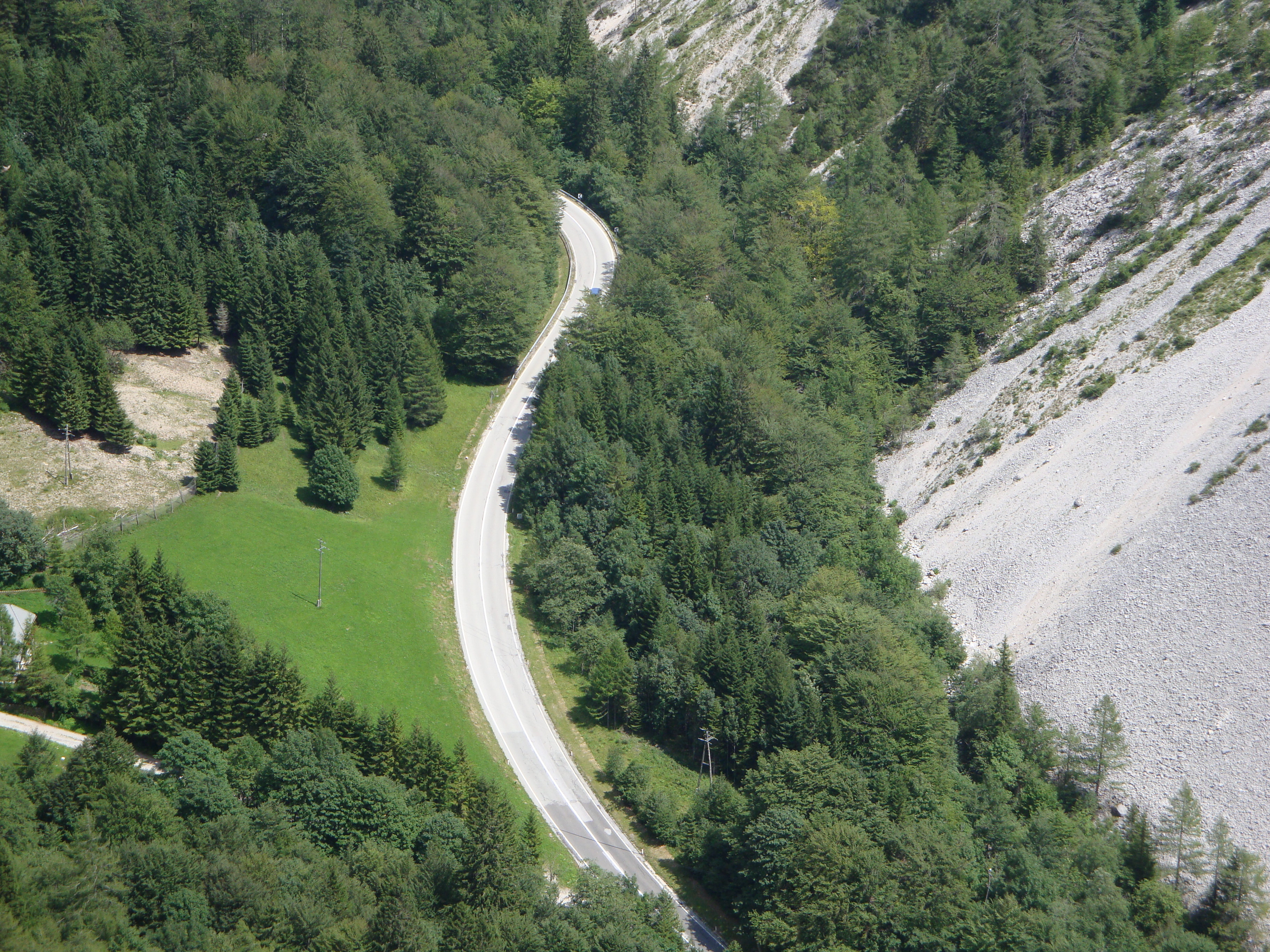 Cesta na Ljubelj z Bornove poti